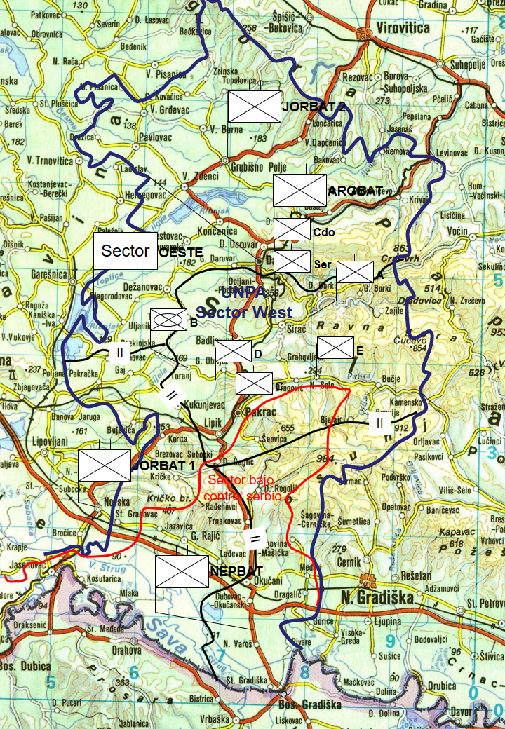 Confeccionado sobre la base de: Servicio Histórico del Ejército. El Ejército Argentino y las Operaciones de Mantenimiento de la Paz. UNPROFOR. Volumen V. Pag 52 y ss.